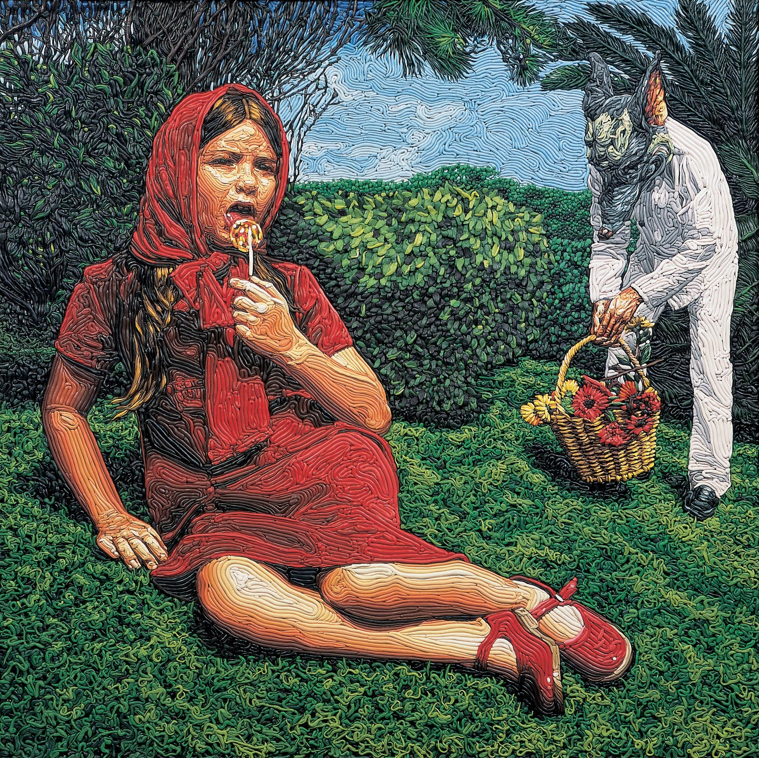 serie roja / red series // 2004 // 100 x 100 cm //plastilina sobre madera / plasticine on wood